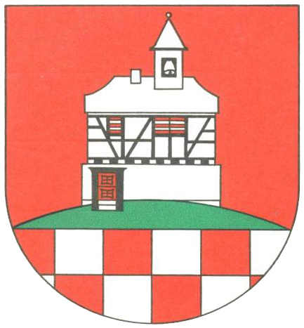 Wappen von Hattgenstein